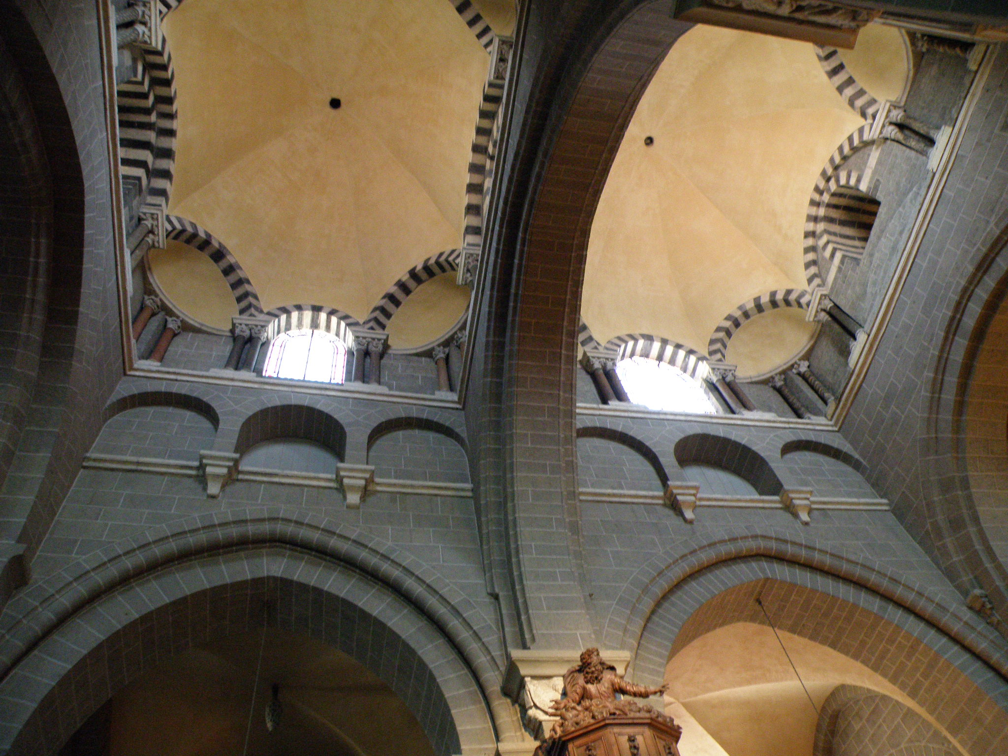 Le Puy-en-Velay (préf. de la Haute-Loire, France), la cathédrale : coupoles de la nef.